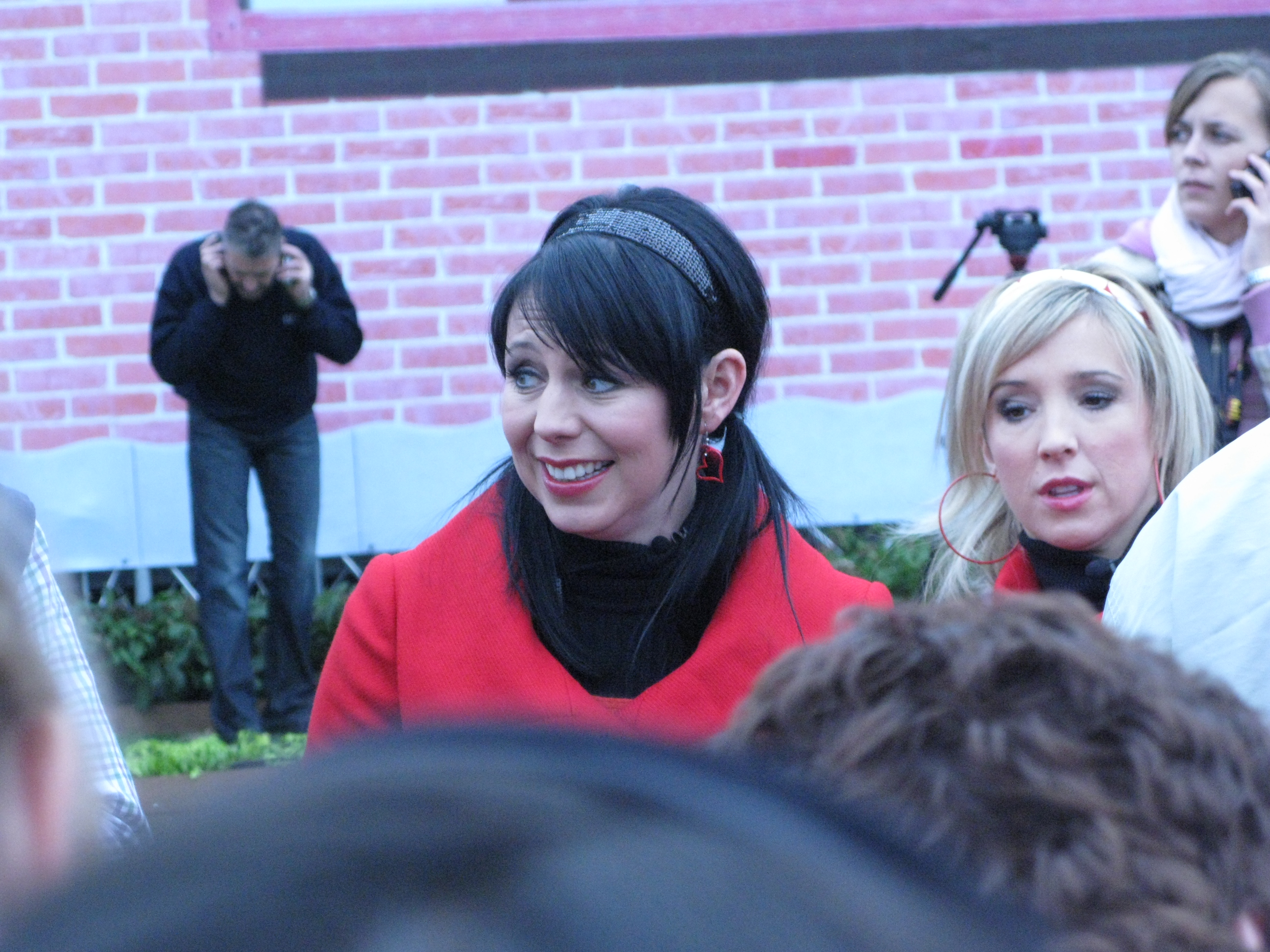 Kristel Verbeke en Kathleen Aerts from the band K3